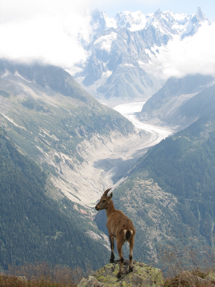 Bouquetin face à la Mer de Glace.